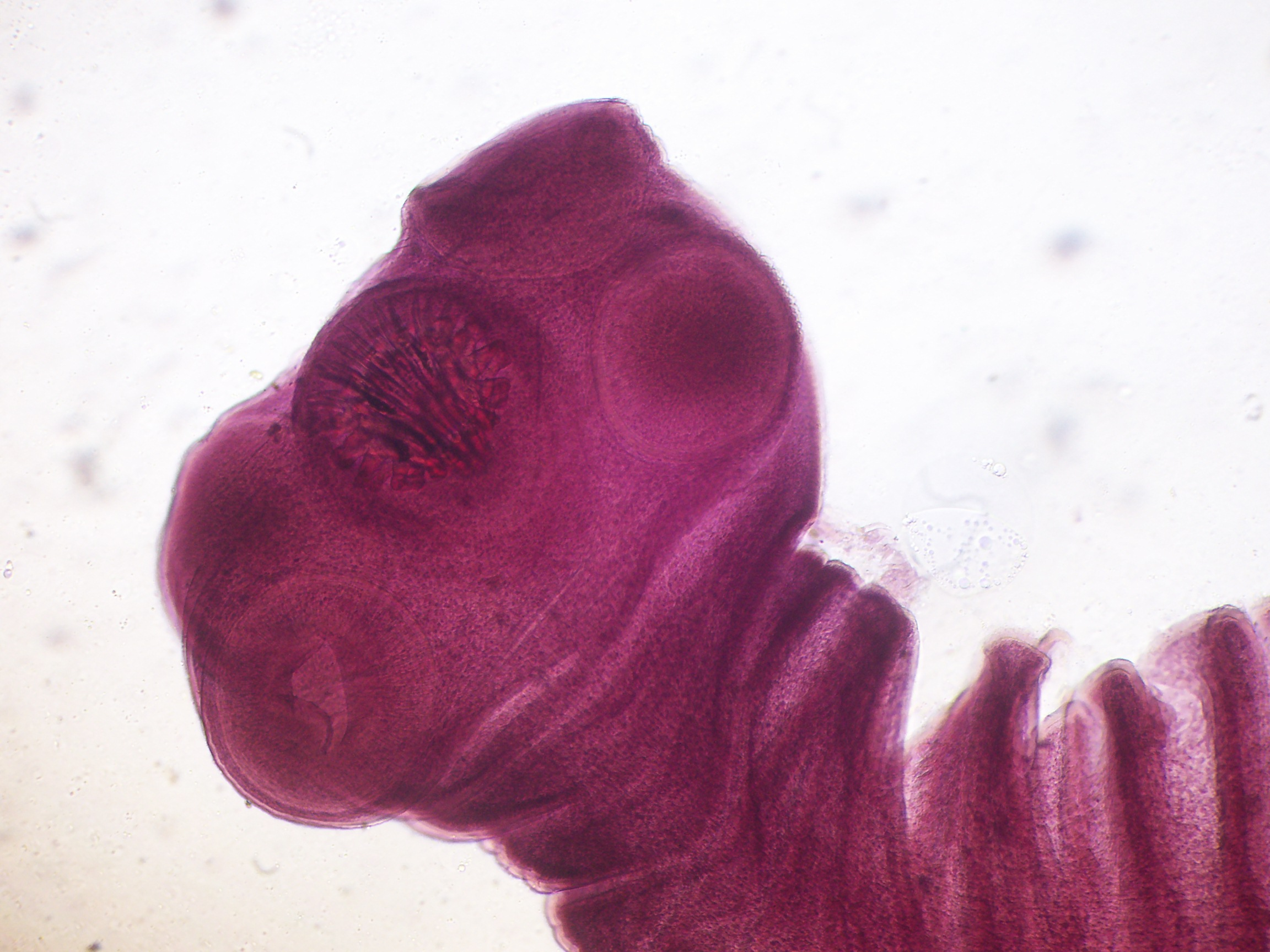 Сколекс свиного цепня (Оптический микроскоп 40×)